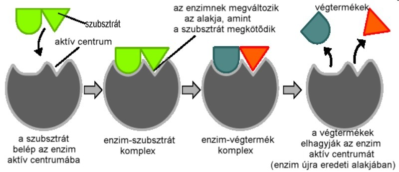 Enzimek aktív centrumának működése (ez a ma elfogadott enzimműködési modell)